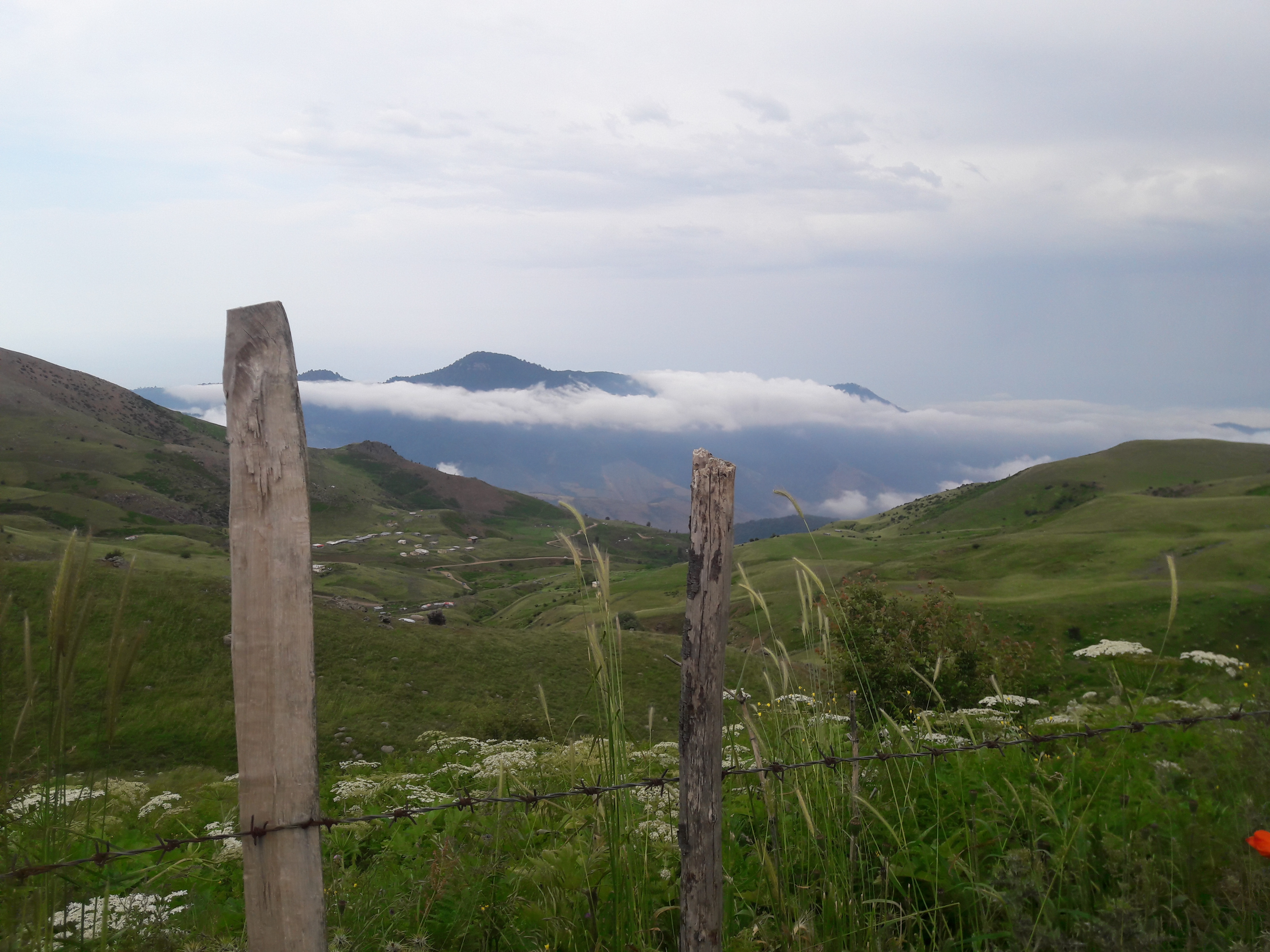 دورنمای قله رشگاژی از اسبومار